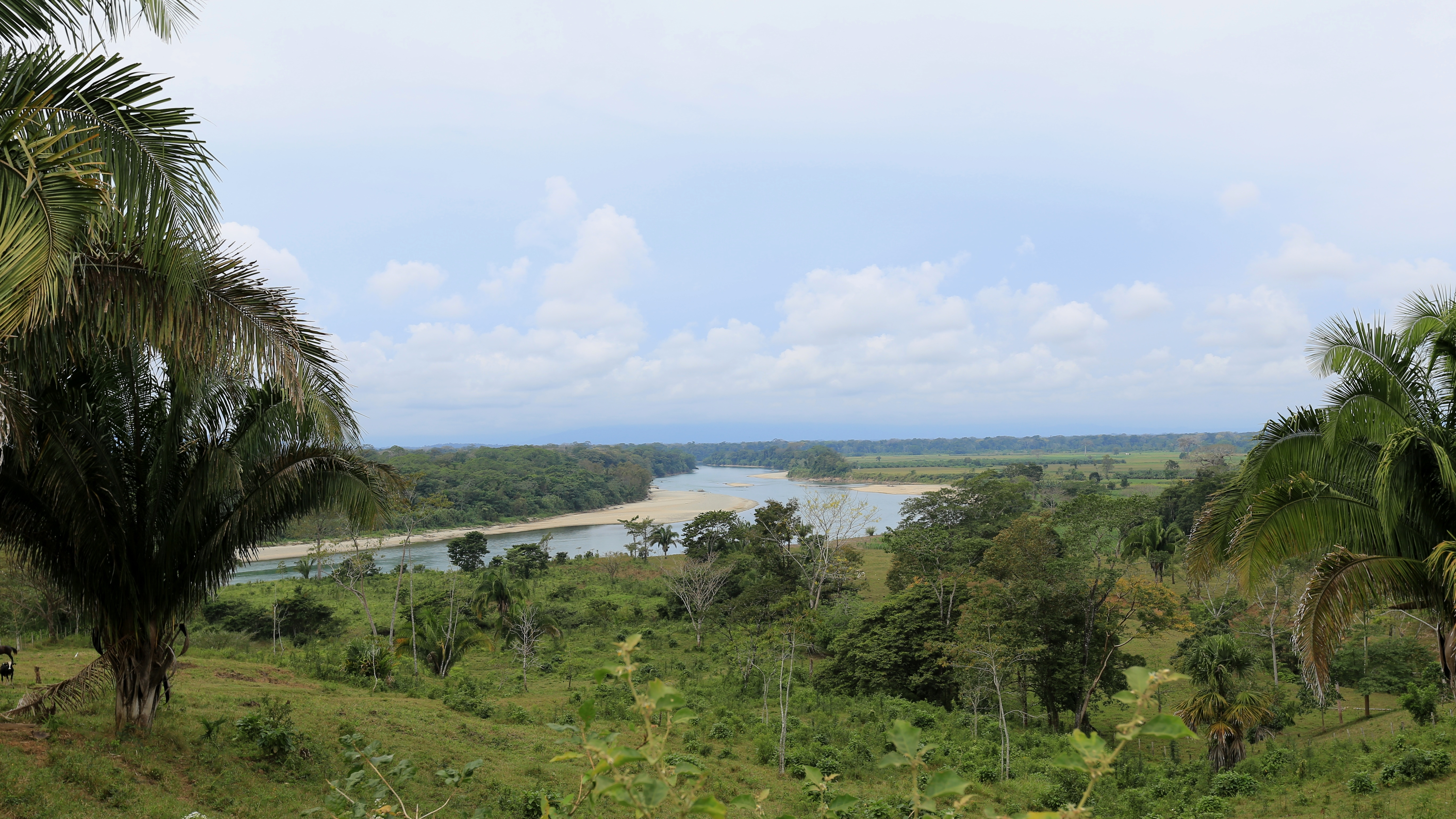 Río Lacantún